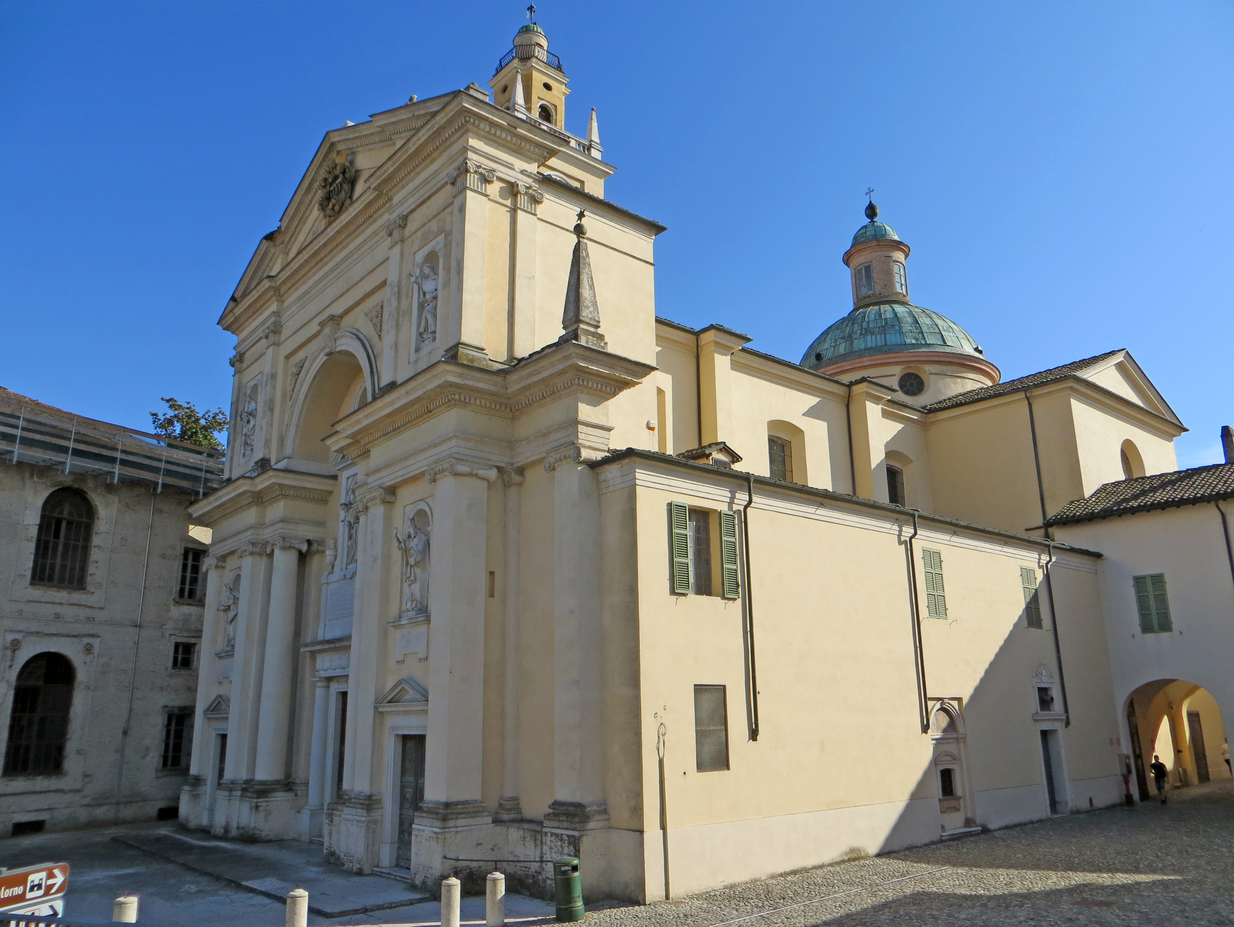 Cappella ducale di San Liborio (Colorno) - facciata e lato nord-ovest This is a photo of a monument which is part of cultural heritage of Italy.